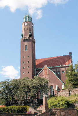 Engelbrektskyrkan, Stockholm, Sweden. Erected 1906-1914. Architect: Lars Israel Wahlman.